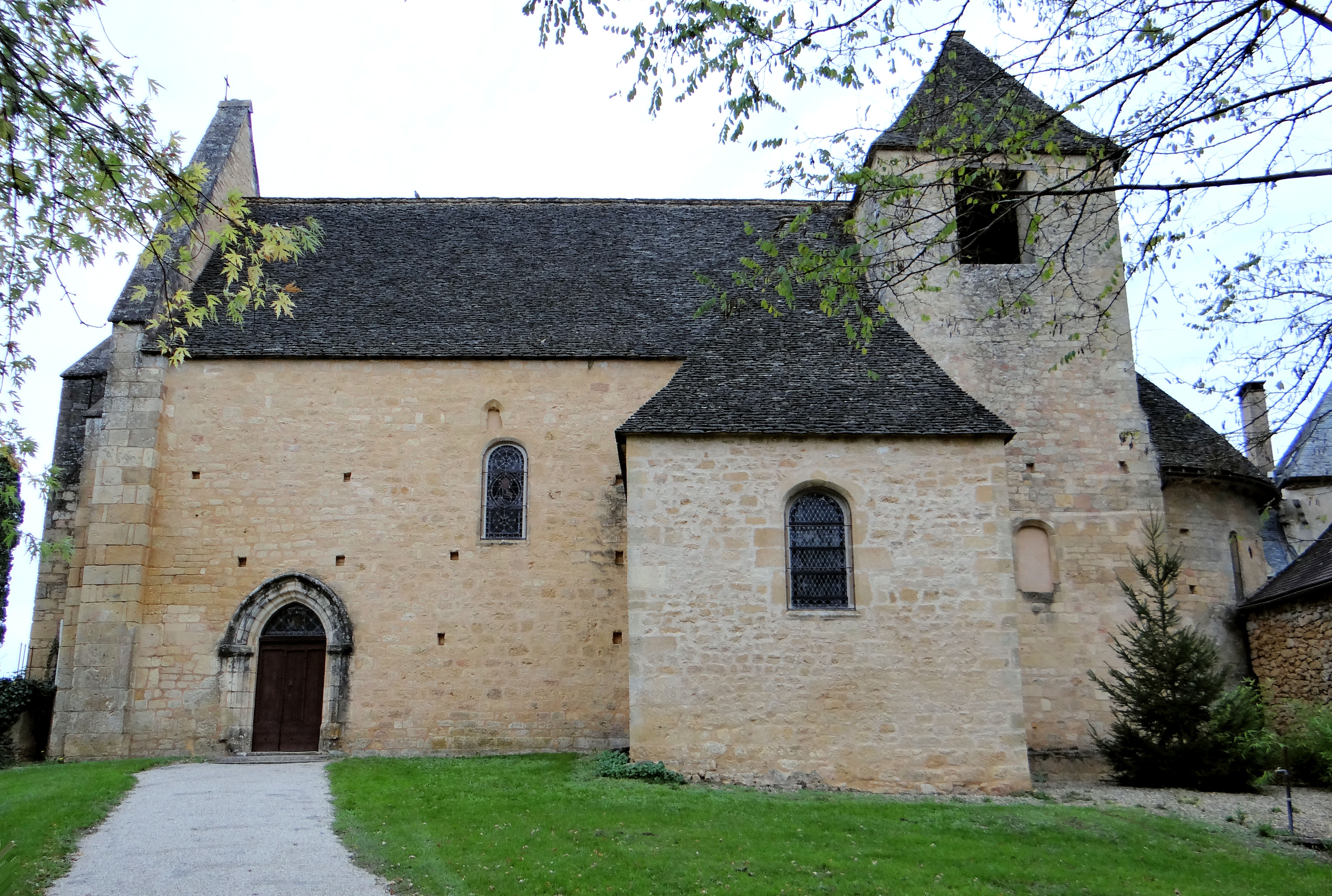 Groléjac - Église Saint-Léger